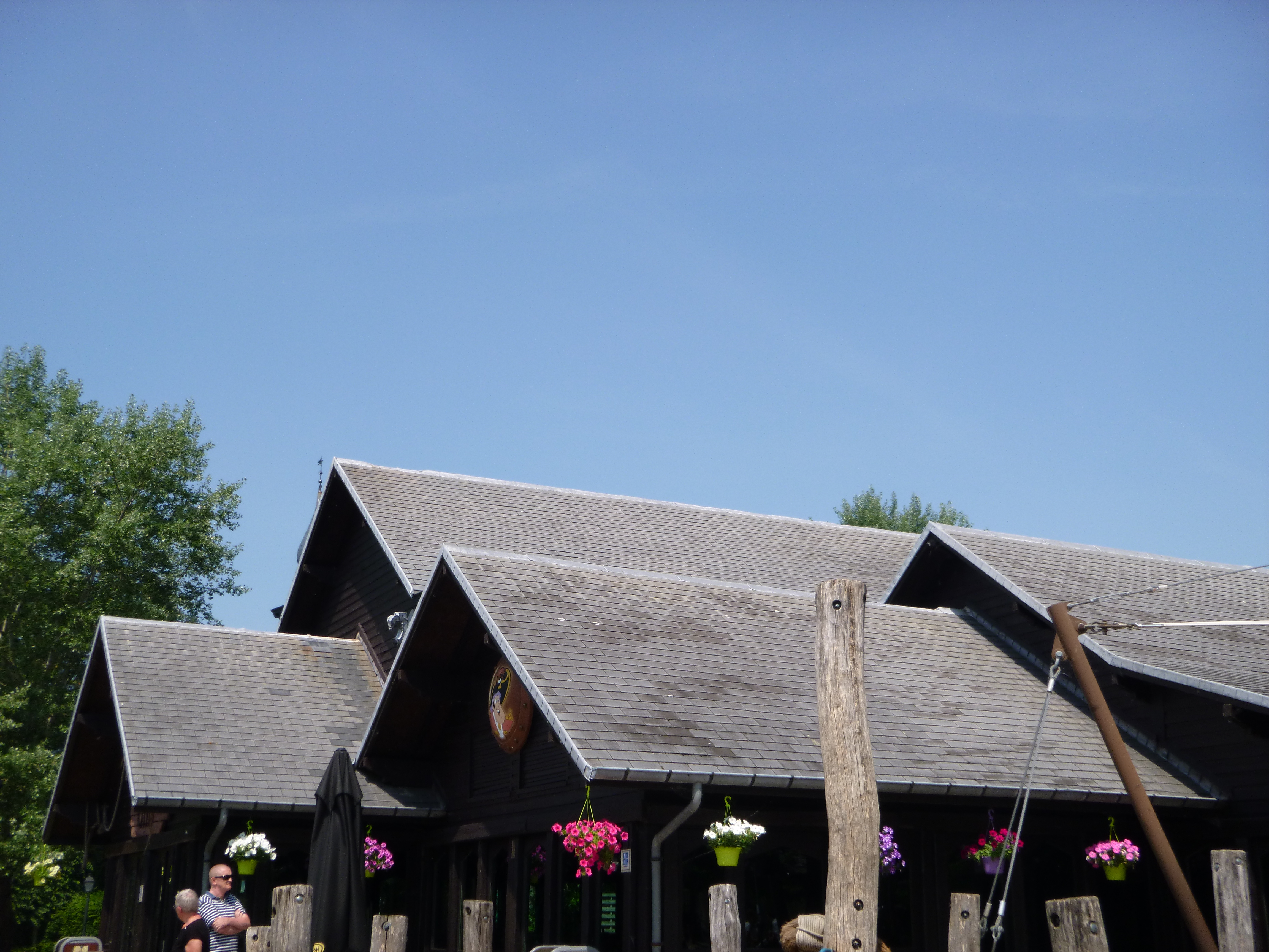 Le point de restauration Piraten Grill